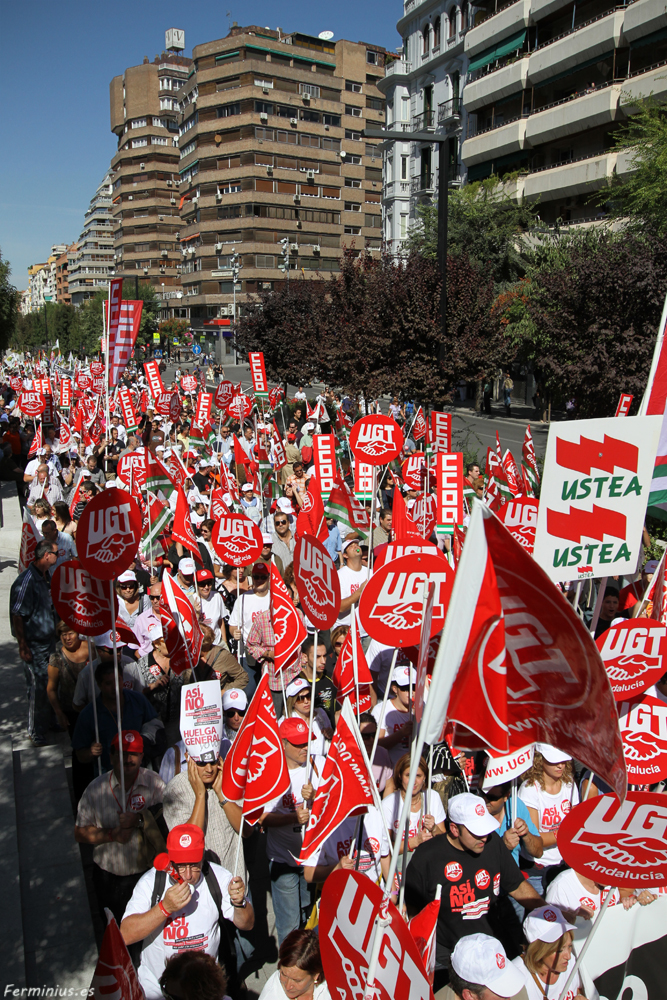 Vaga General 29-S a Granada.